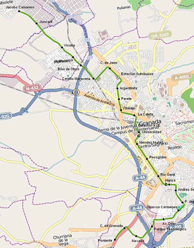 Plano con las paradas de la L1 del Metropolitano de Granada.